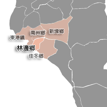 屏東縣林邊鄉相對位置。